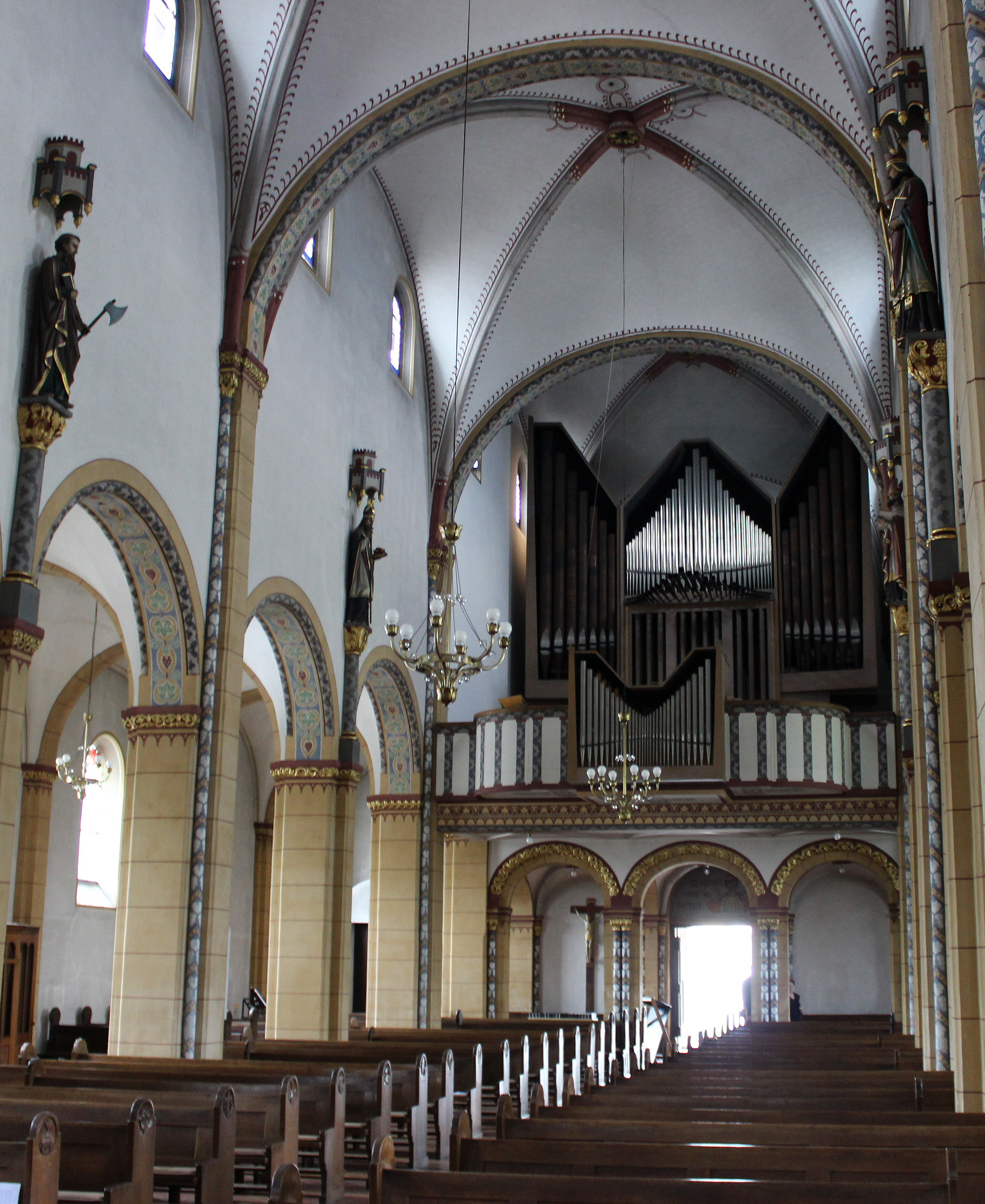 Blick ins Innere der katholischen Pfarrkirche St. Marien in Ensdorf, Landkreis Saarlouis, Saarland